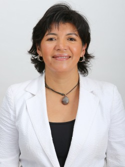 Yasna Provoste Campillay, política chilena.